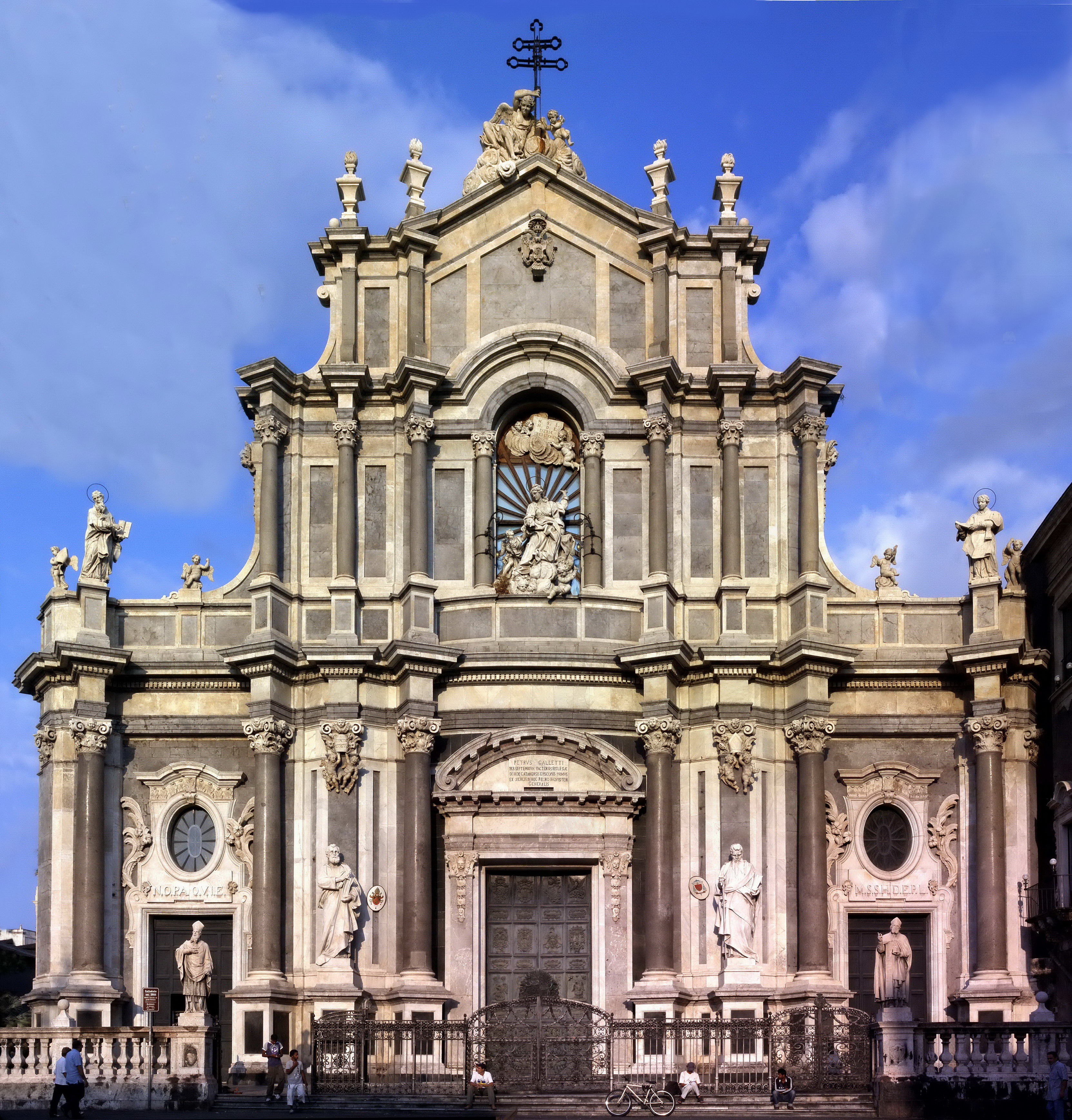 Facciata del Duomo (Cattedrale di Sant'Agata) di Catania ad alta risoluzione - Zoomabile per vedere dettagli